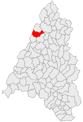 Categorie:Hărţi ale judeţului Bihor